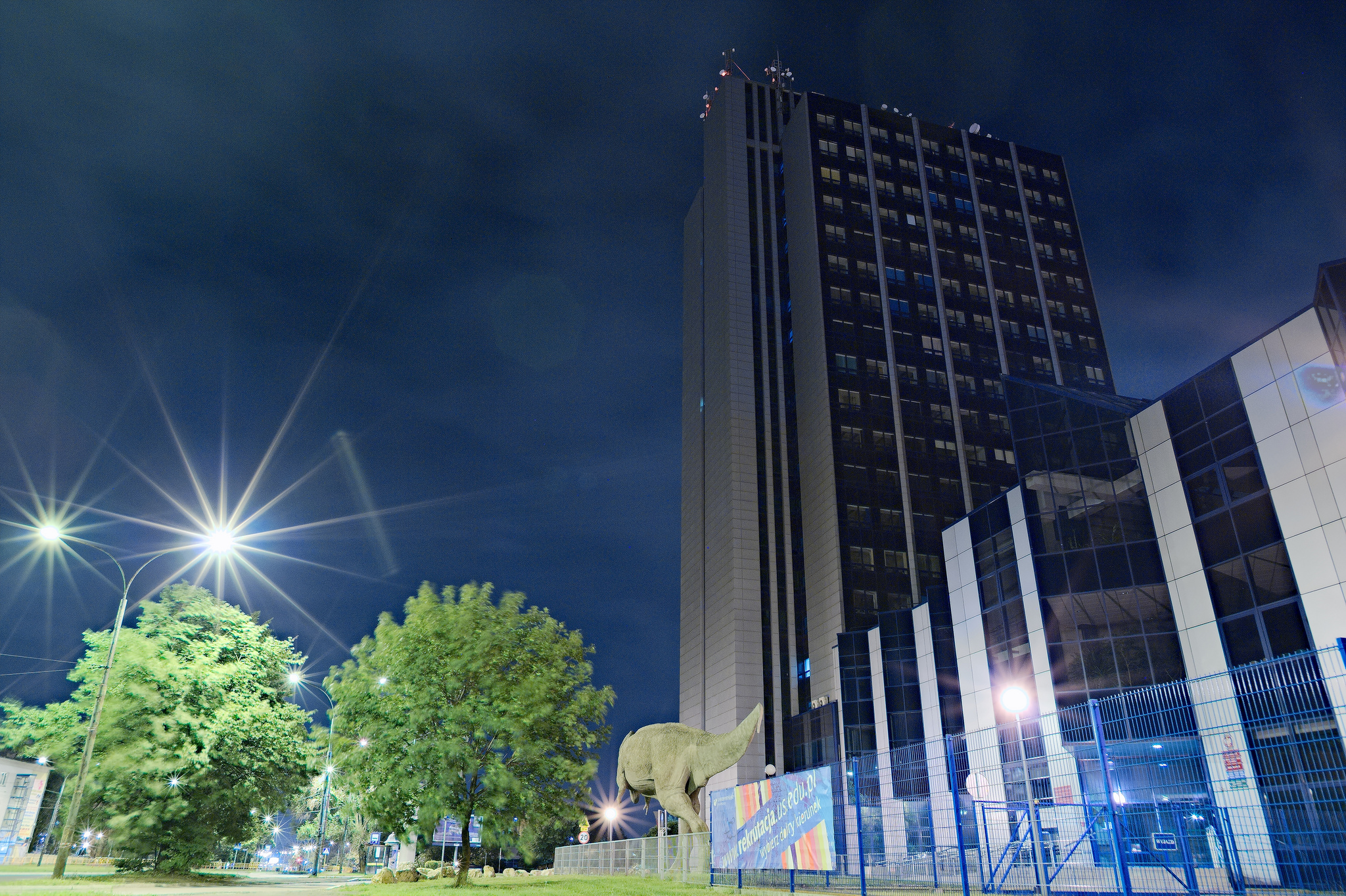 wydział nauk o ziemi